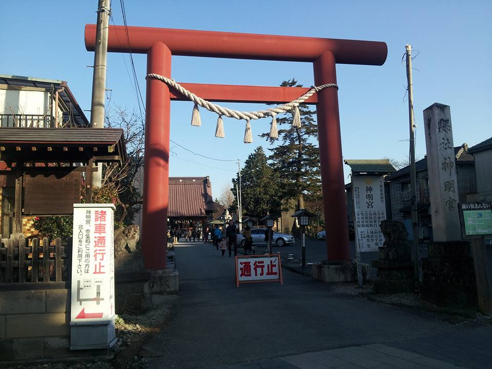 栃木県栃木市旭町・神明宮の大鳥居。